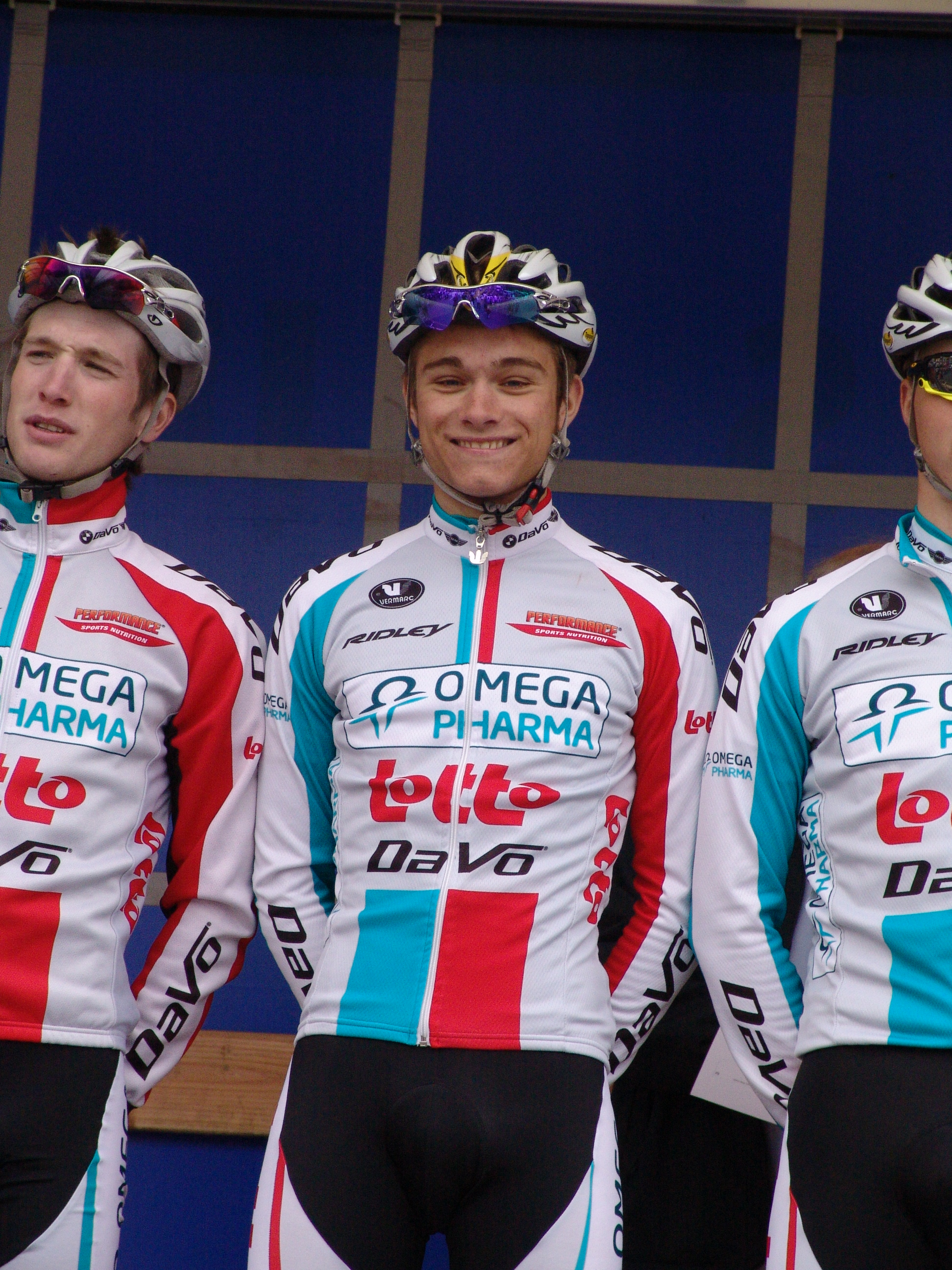 Tosh Van der Sande voor de start van Luik-Bastenaken-Luik U23 2011, de wedstrijd die hij later wint.